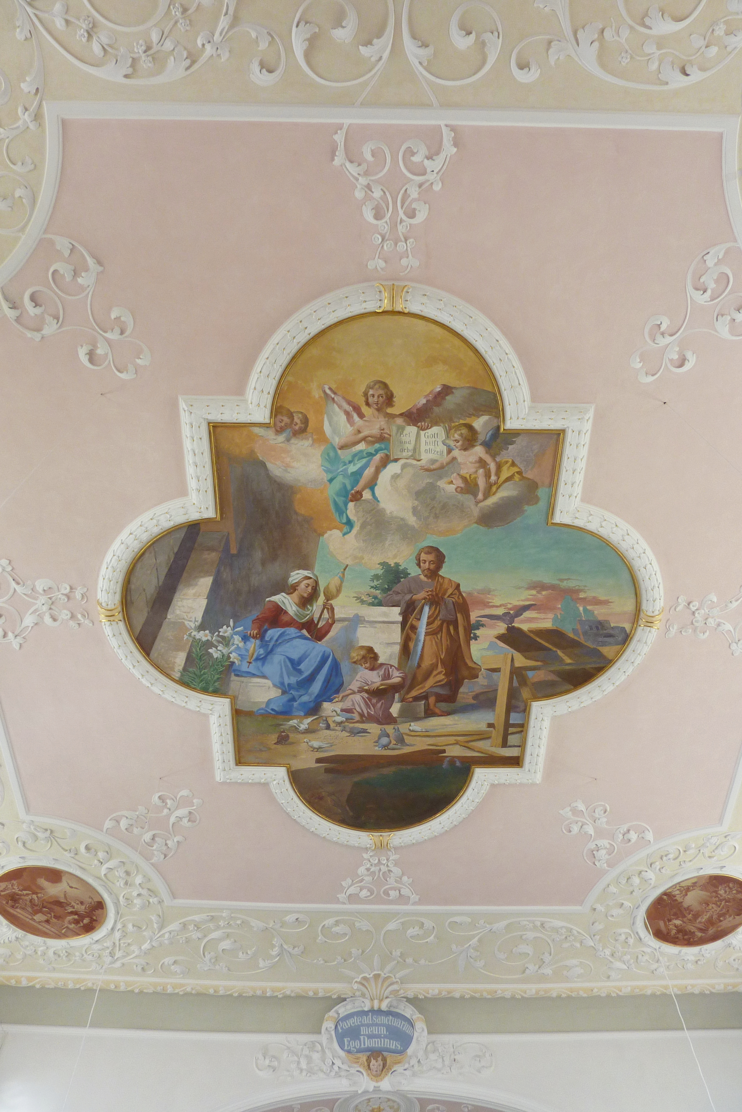 Katholische Pfarrkirche St. Peter und Paul in Ried (Jettingen-Scheppach) im Landkreis Günzburg (Bayern), Deckenmalerei im Langhaus, von Leonhard Thoma (1908), Darstellung: Heilige Familie